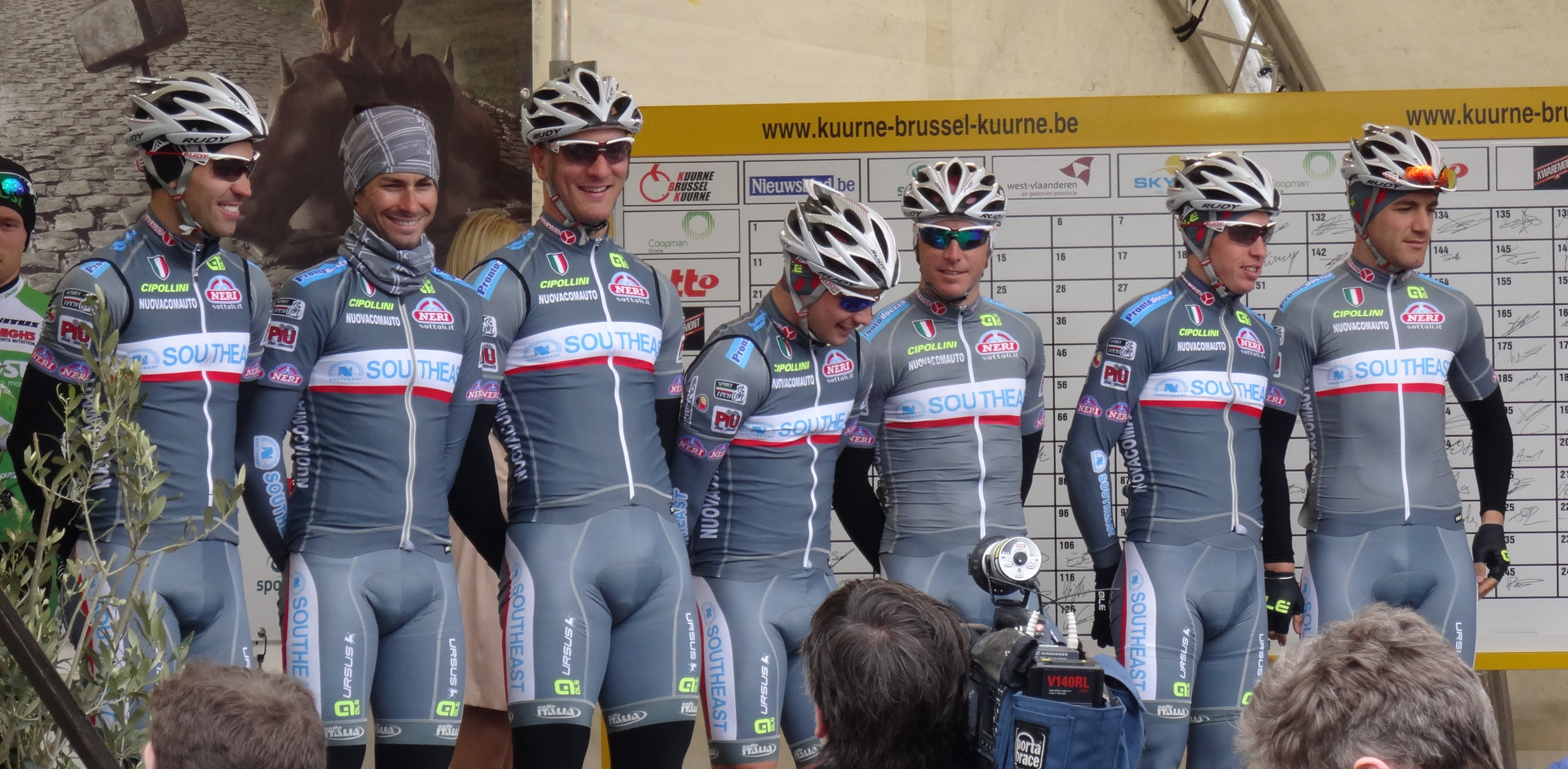 Reportage réalisé le dimanche 1er mars à l'occasion du départ et de l'arrivée de Kuurne-Bruxelles-Kuurne 2015 à Kuurne, Belgique.